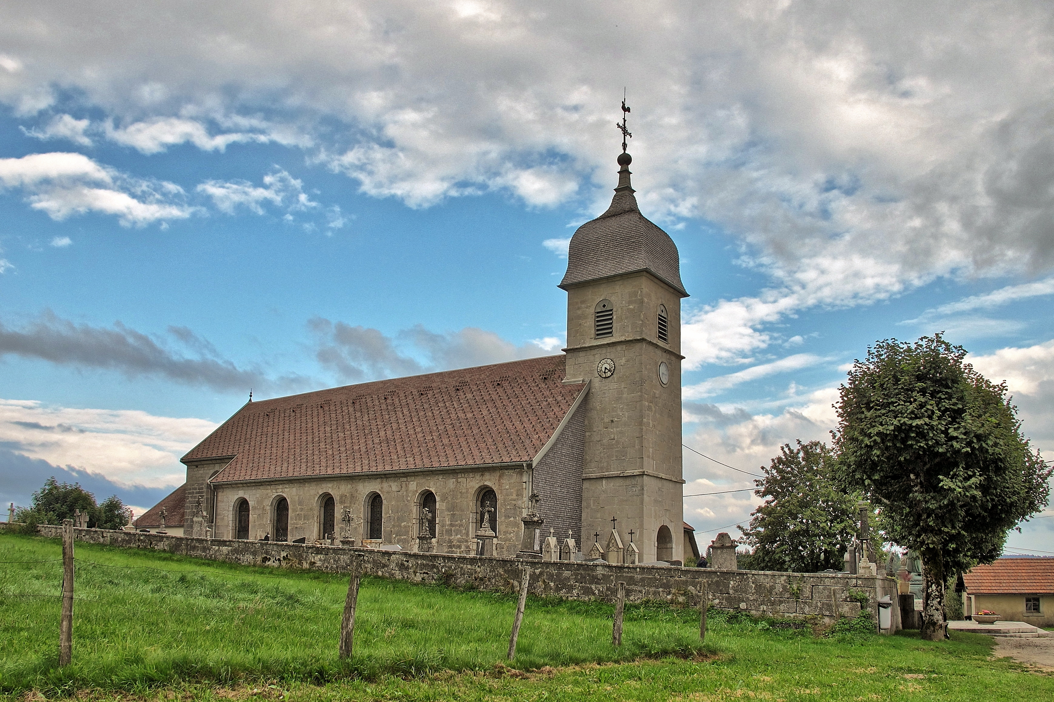 Inscrit aux monuments historiques sous le numéro PA00101449